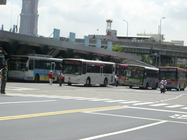 高雄車站(公車)許多公車入站盛況